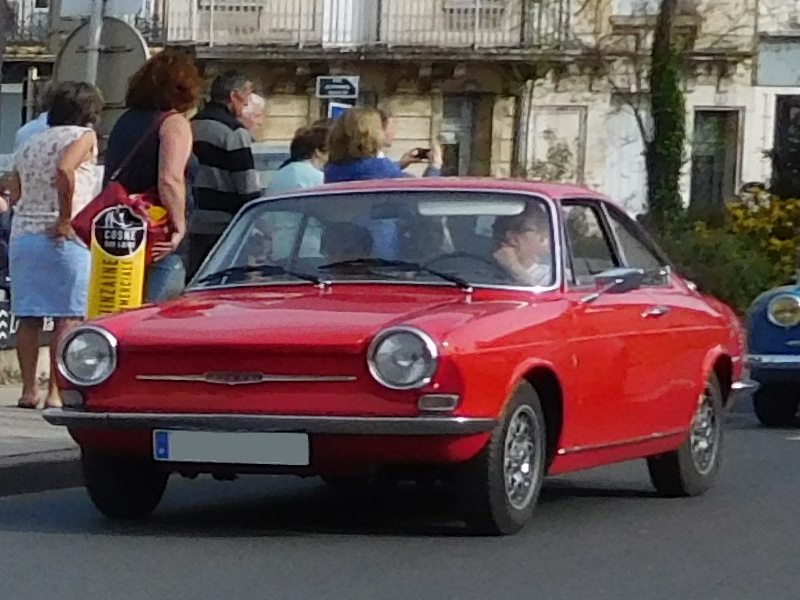 Simca 1000 Coupé rouge.